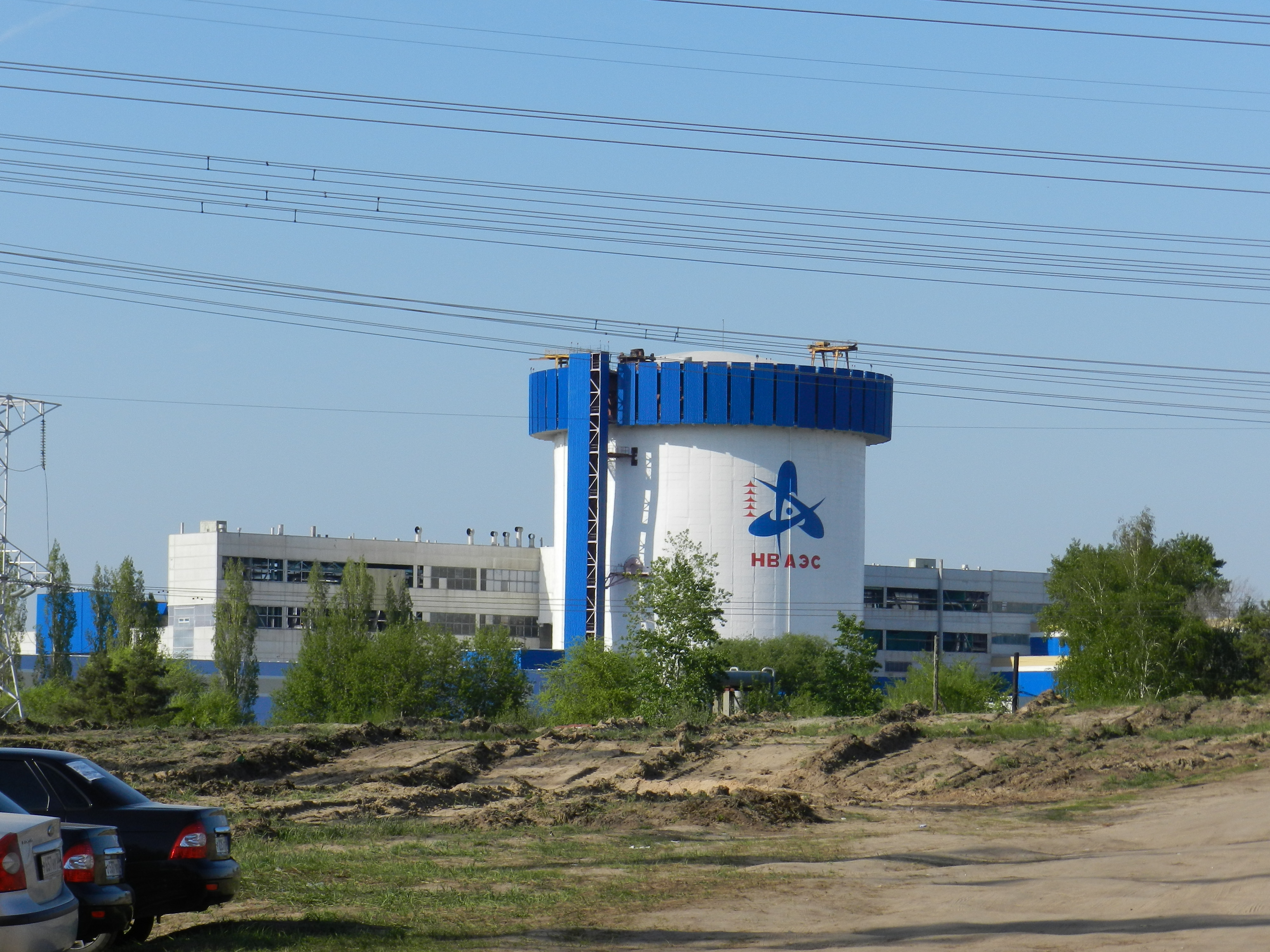 Нововоронежская атомная электростанция (АЭС) имени 50-летия СССР — один из первых объектов атомной энергетики (Воронежская область, Нововоронеж, Нововоронеж)